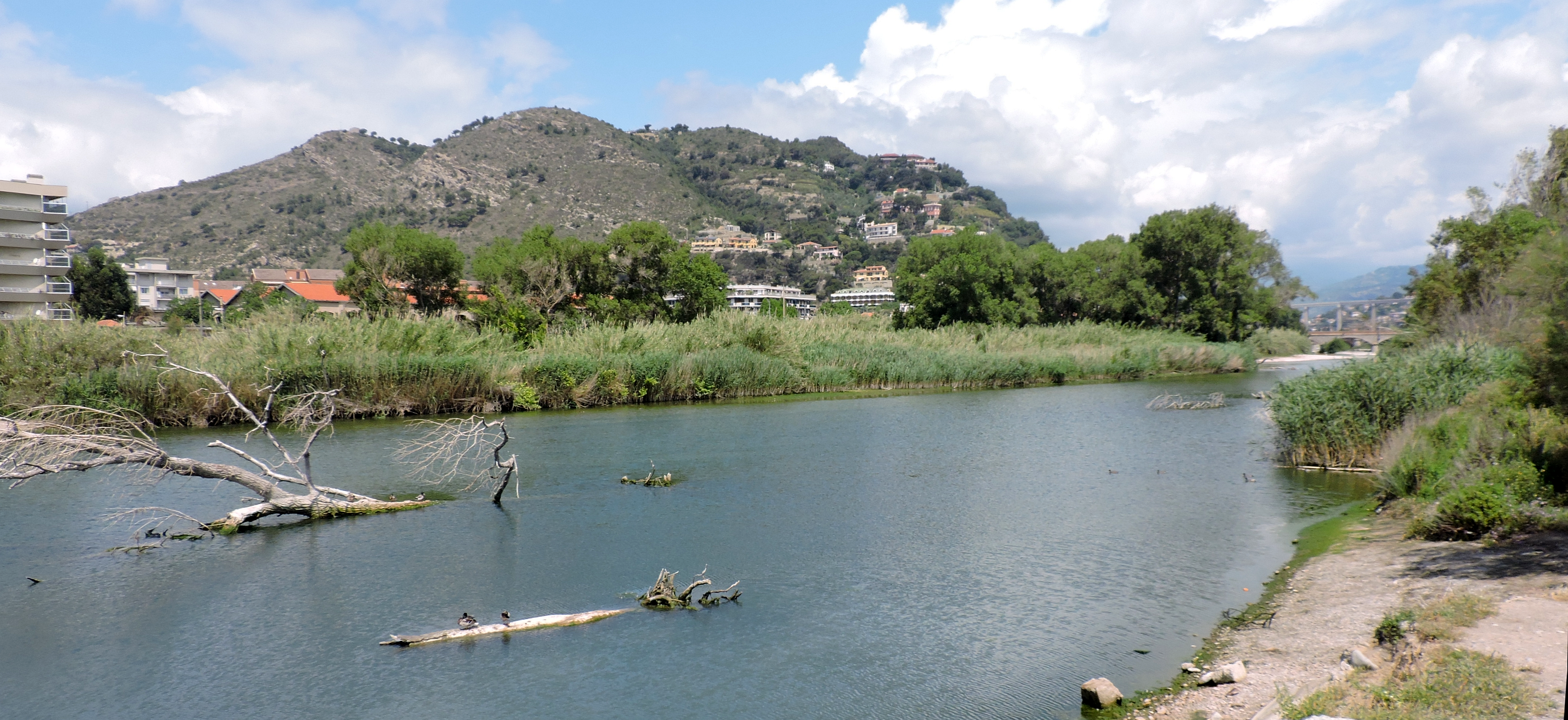 Torrente Nervia (Q49961367)